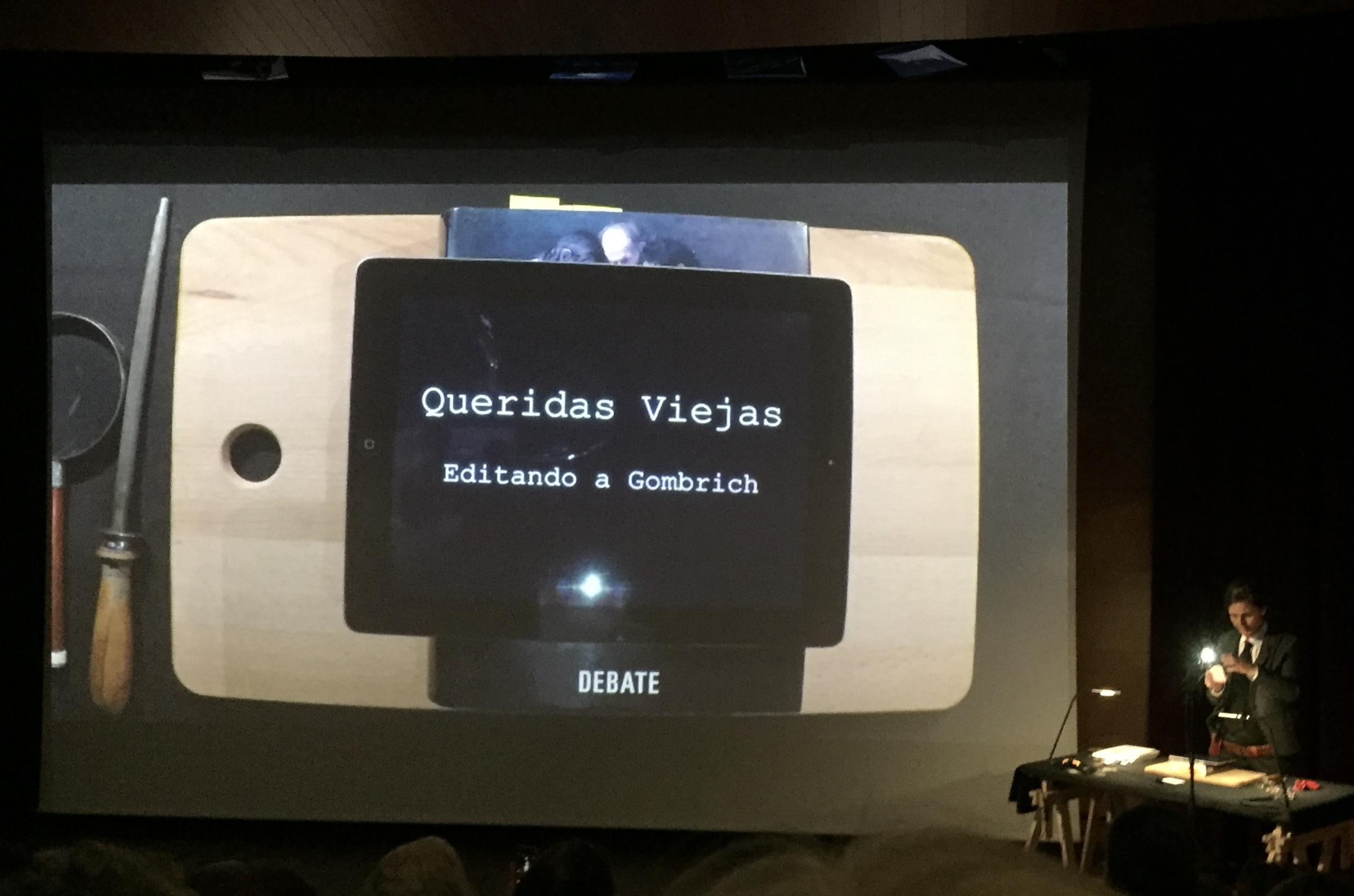 Performance realizado en el Museo del Prado. Editando el libro de Historia del Arte de Gombrich incluye a mujeres omitidas en el.